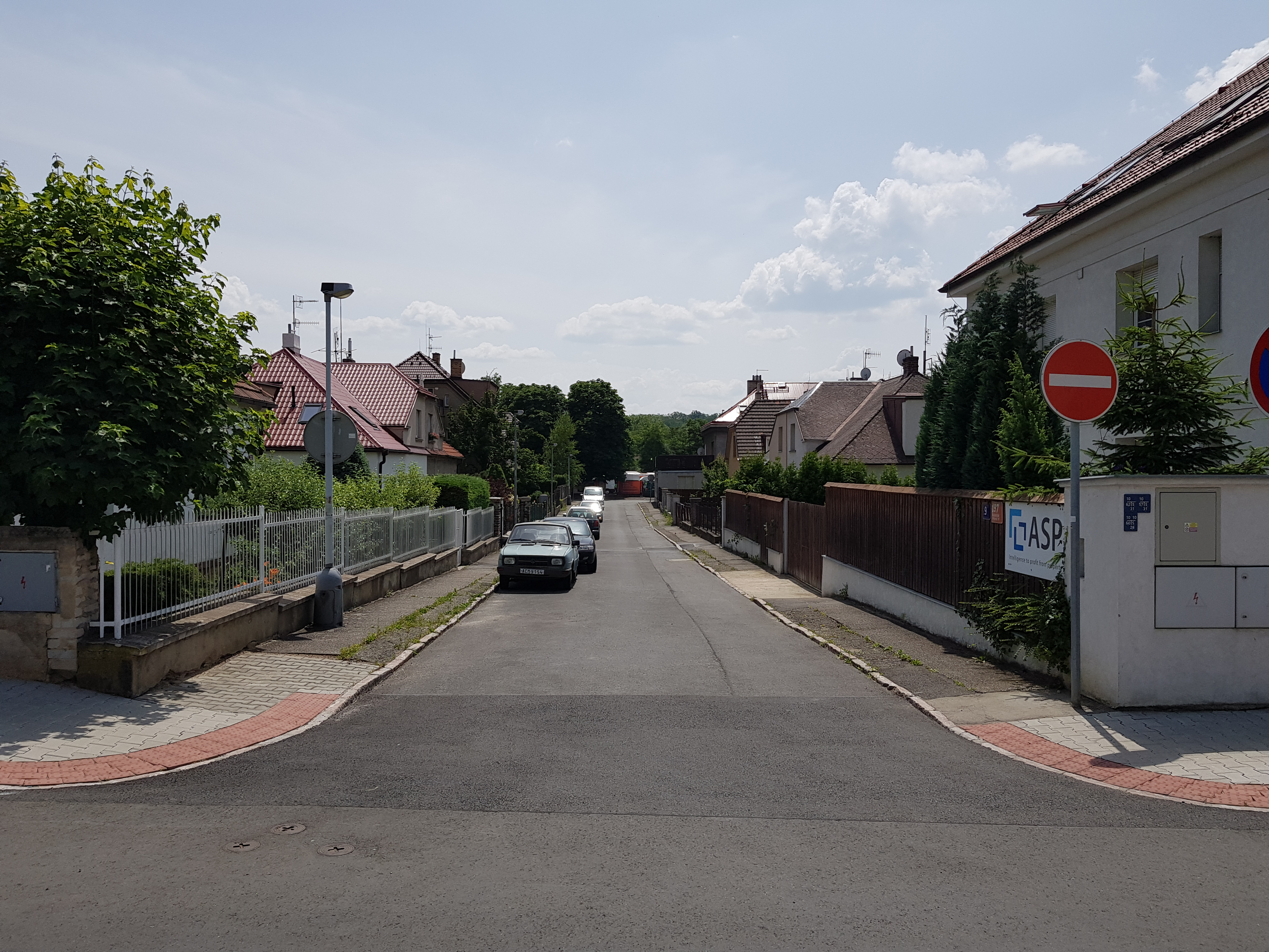 Milovická ulice, Praha-Hloubětín, pohled od severu.